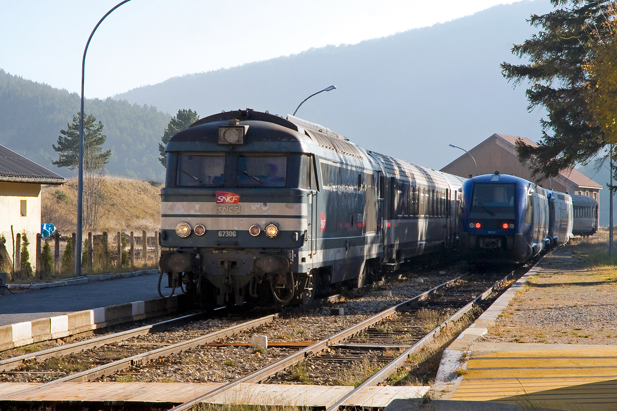 Croisement de trains en gare de Lus-la-Croix-Haute (26, Drôme, ligne Lyon-Perrache - Marseille-Saint-Charles)